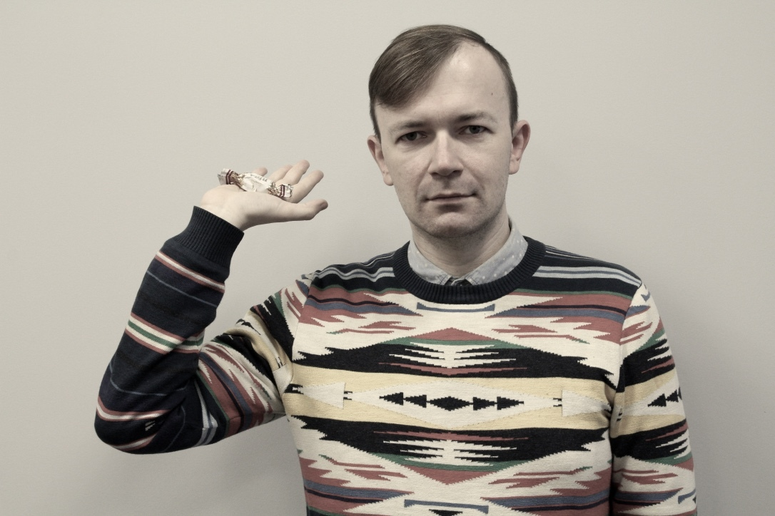 Karlis Vērdiņš, LU LFMI 2016